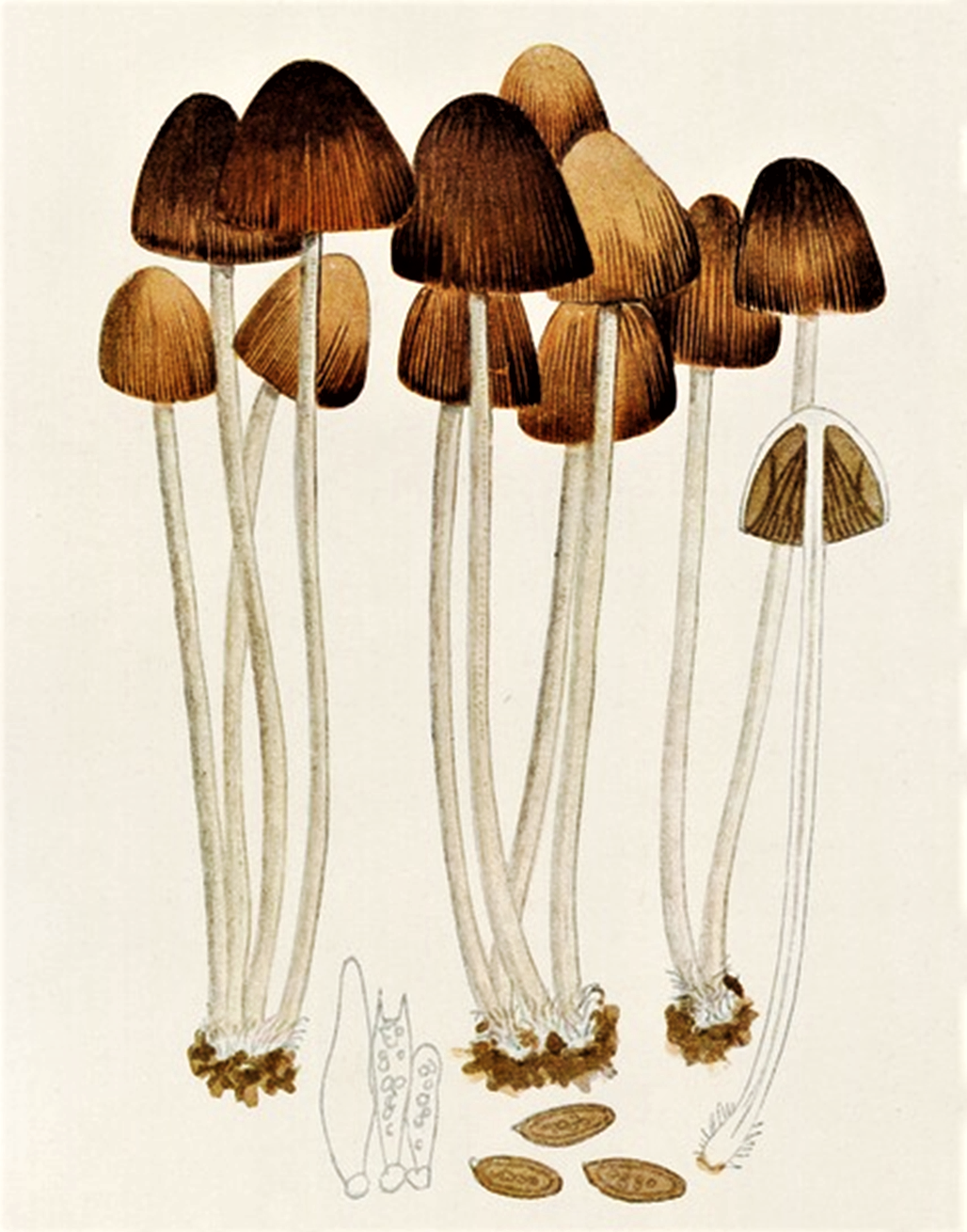 Bres. Psathyrella subatrata (Batsch, 1786) Gillet (1878)